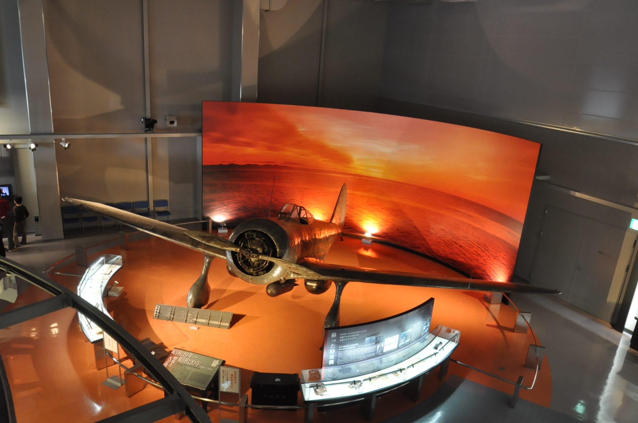 九七式戦闘機乙型。筑前町立大刀洗平和記念館にあり、世界で唯一完全な状態で現存している。機体番号は不明で、本来写真撮影は禁止であるが、稀に許可を得られることがある。